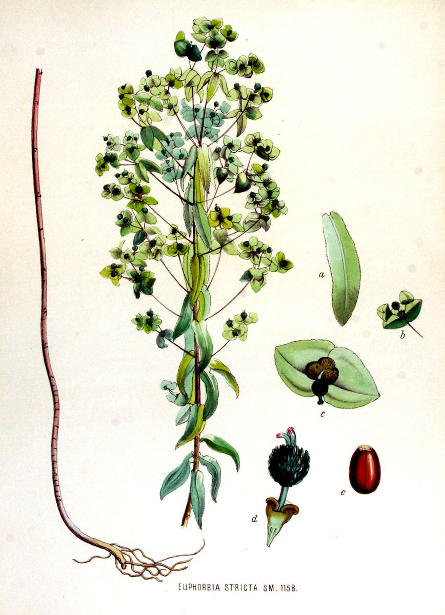 Euphorbia stricta, stijve wolfsmelk